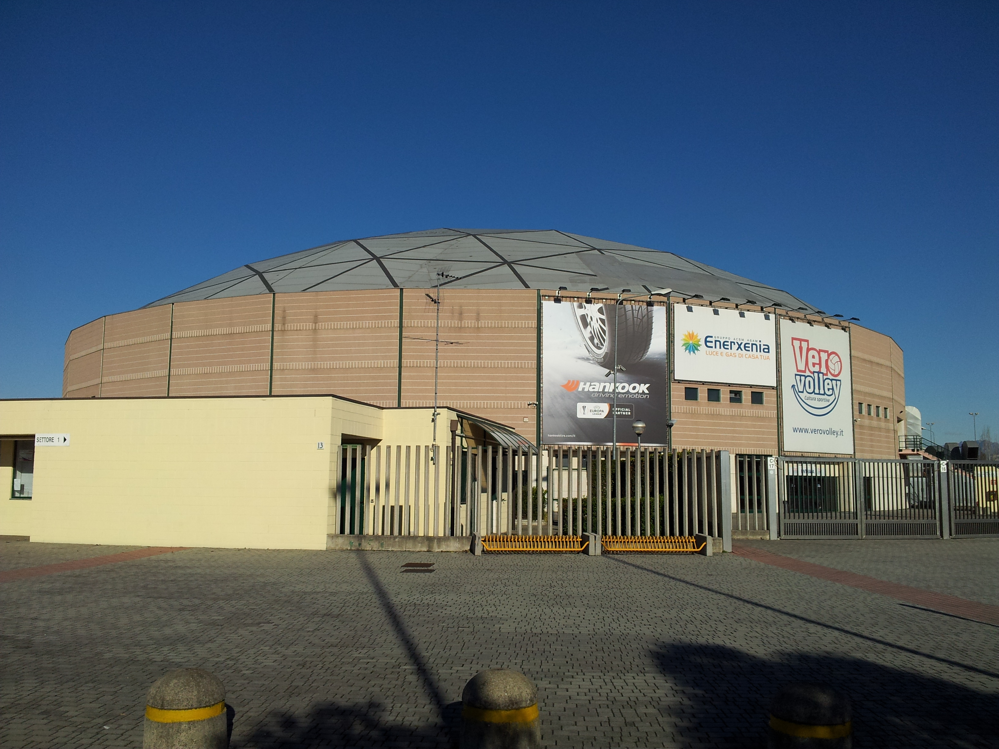 Palazzetto dello Sport di Monza